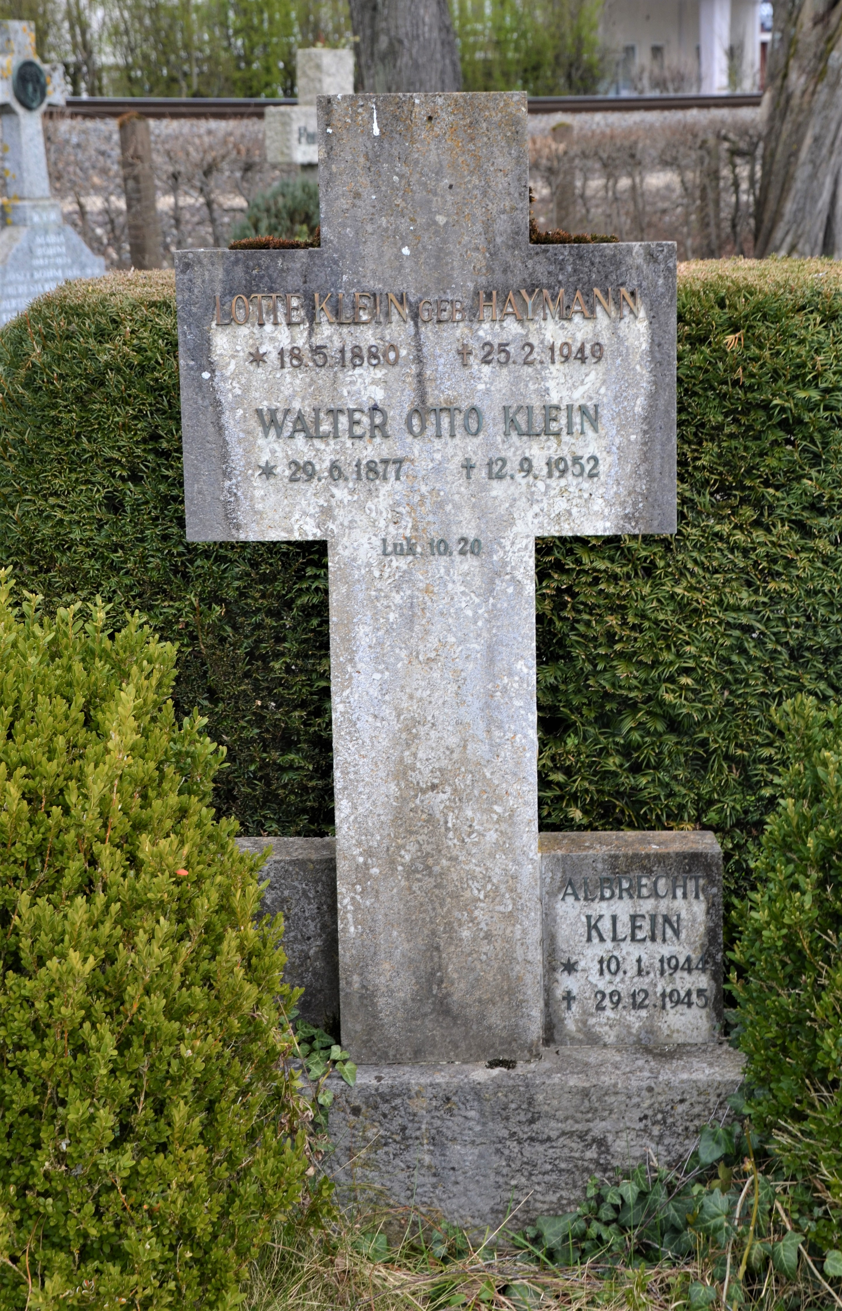 Grabmal von Walter Otto Klein auf dem Leonhardsfriedhof in Schwäbisch Gmünd